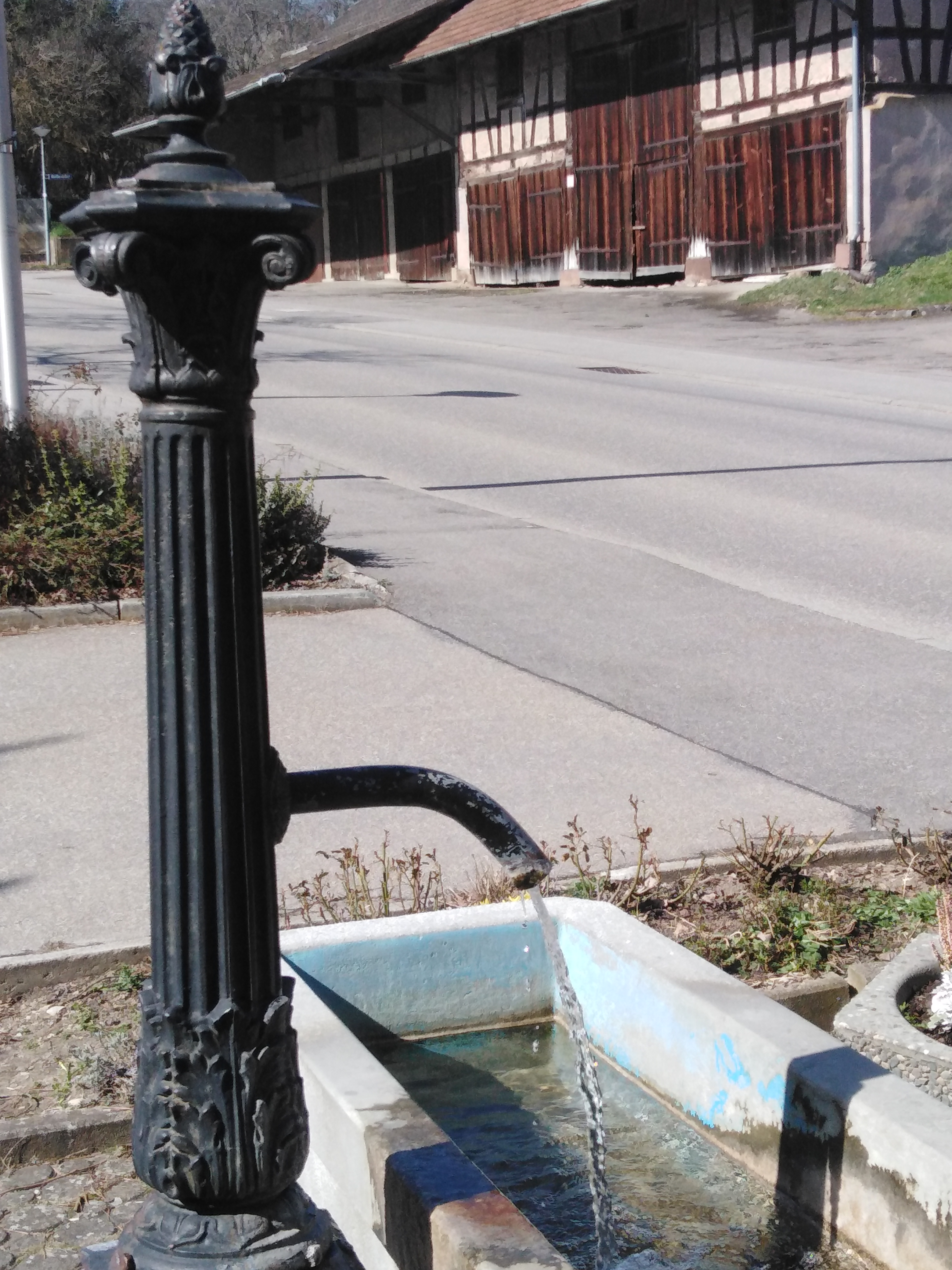 Laufbrunnen mit gusseiserner Säule (ausgehendes 19. Jh.)